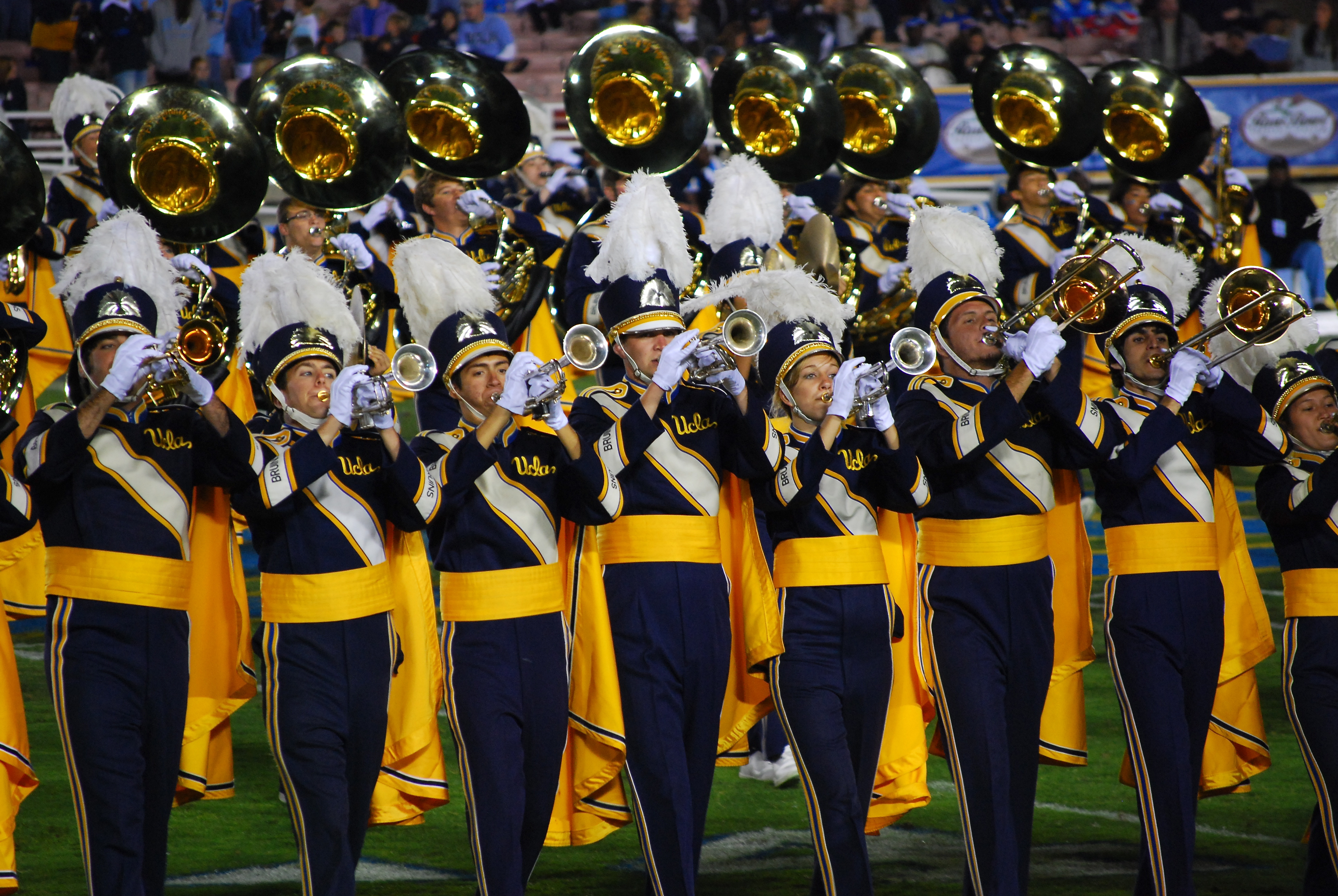 UCLA Marching Band